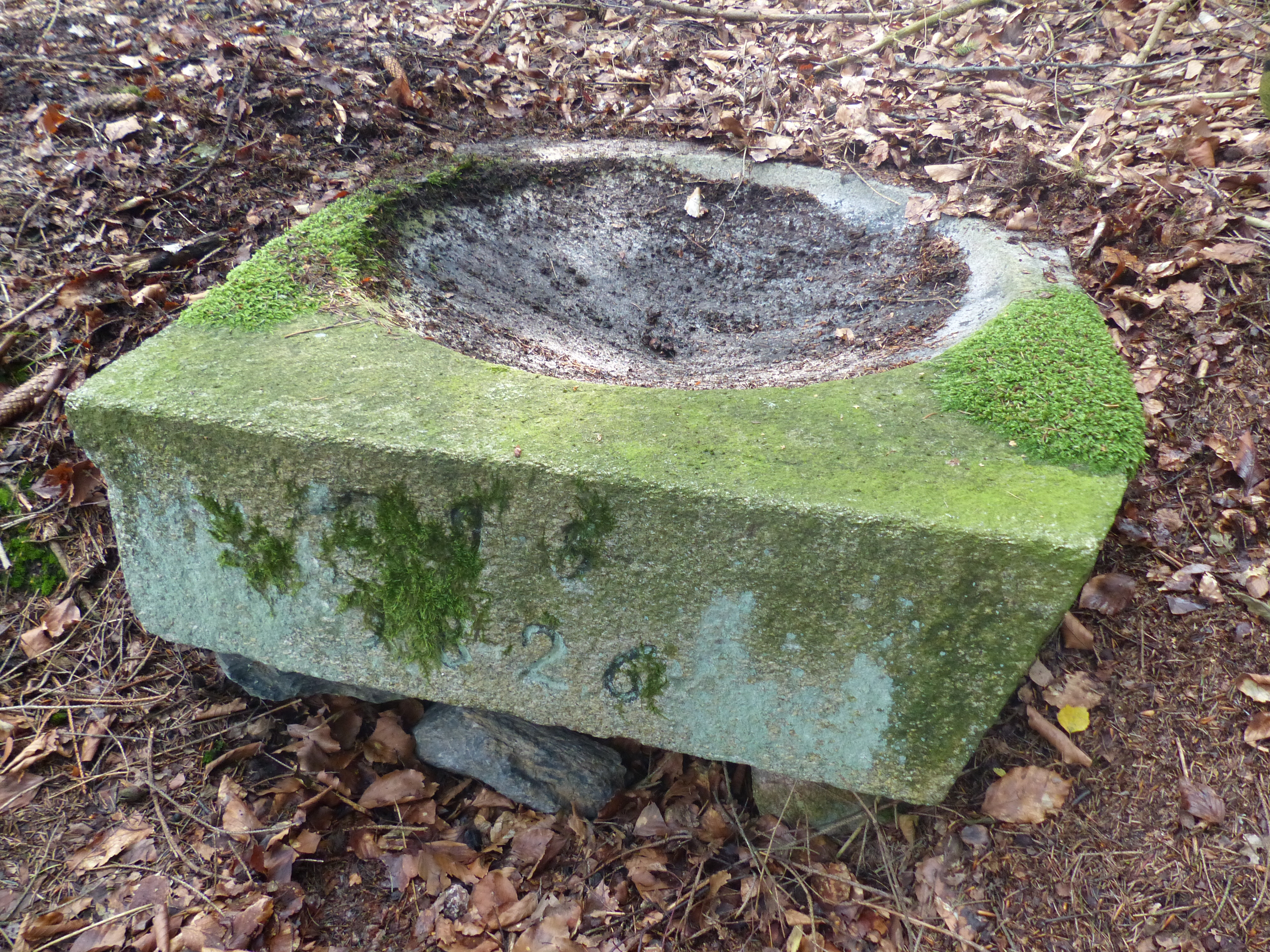 Ansichten aus dem Wald südlich von Quellenreuth